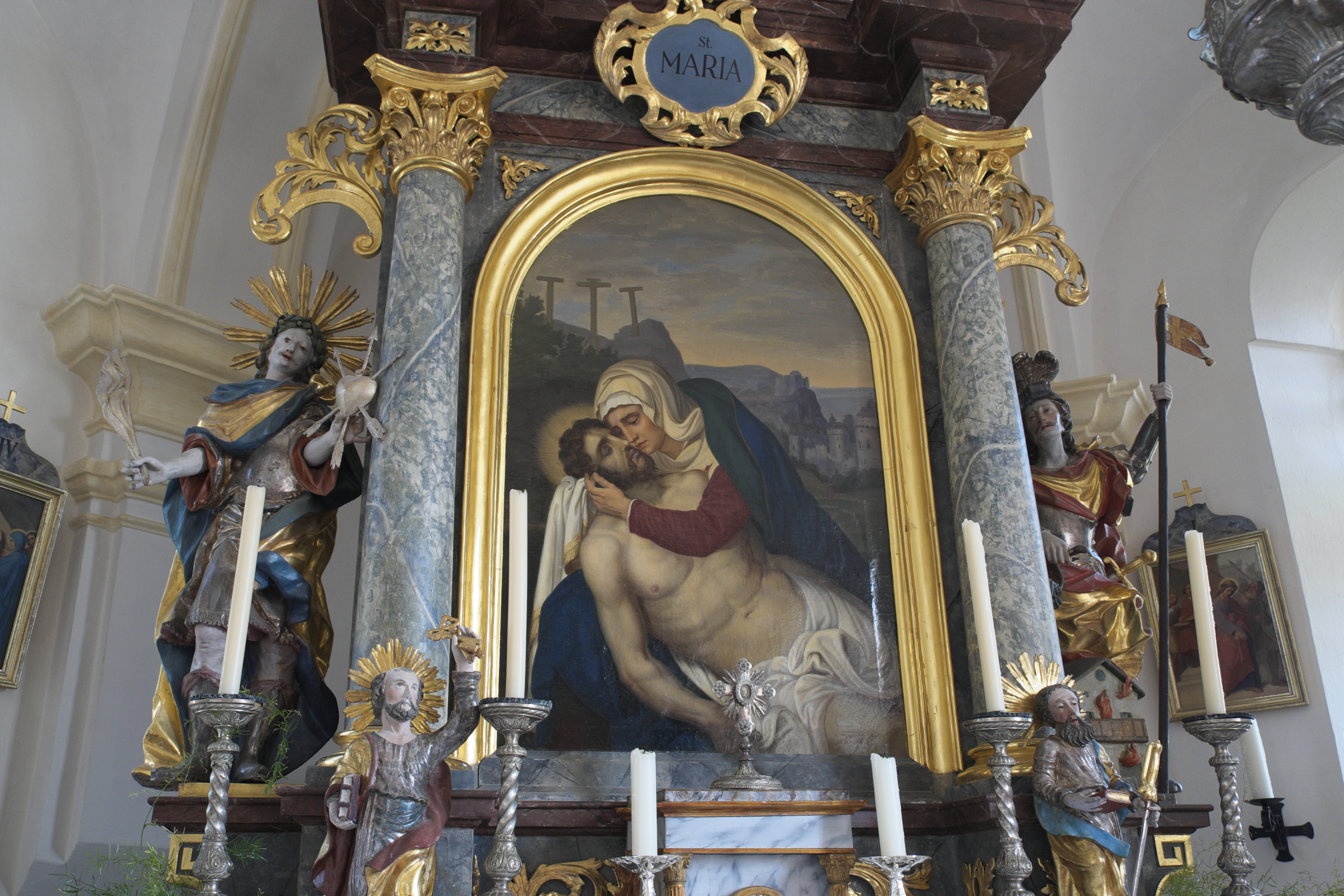 Katholische Kapelle St. Rochus und St. Sebastian in Sollach (Valley) im Landkreis Miesbach (Bayern/Deutschland), Hauptaltar, Ölgemälde mit der Darstellung der Beweinung Christi